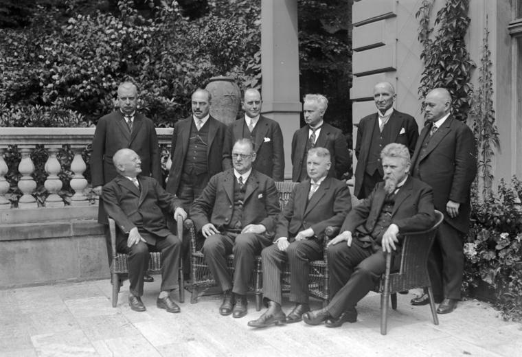 Das neue Reichskabinett nach seiner ersten Sitzung im Reichskanzlerpalais in der Wilhelmstrasse ! stehend v. l.n.r.: Dietrich-Baden, Ernährung (Demokrat), Dr. Hilferding, Finanzen (Sozialdem.), Dr. Curtius, Wirtschaft (Dtsch. Volkspartei), Severing Inneres (Sozialdem.), von Guérard, besetztes Gebiet und Verkehr (Zentr.), Schätzel, Post (bayer. Volkspartei). sitzend v.l.n.r.: Koch-Weser, Justizminister (Demokrat), Reichskanzler Müller (Sozialdem.), Groener, Reichswehrminister (parteilos), Wissel, Reichsarbeitsminister (Sozialdem.). Information added by Wikimedia users.Kabinett Hermann Müller II 28. Juni 1928 – 27. März 1930